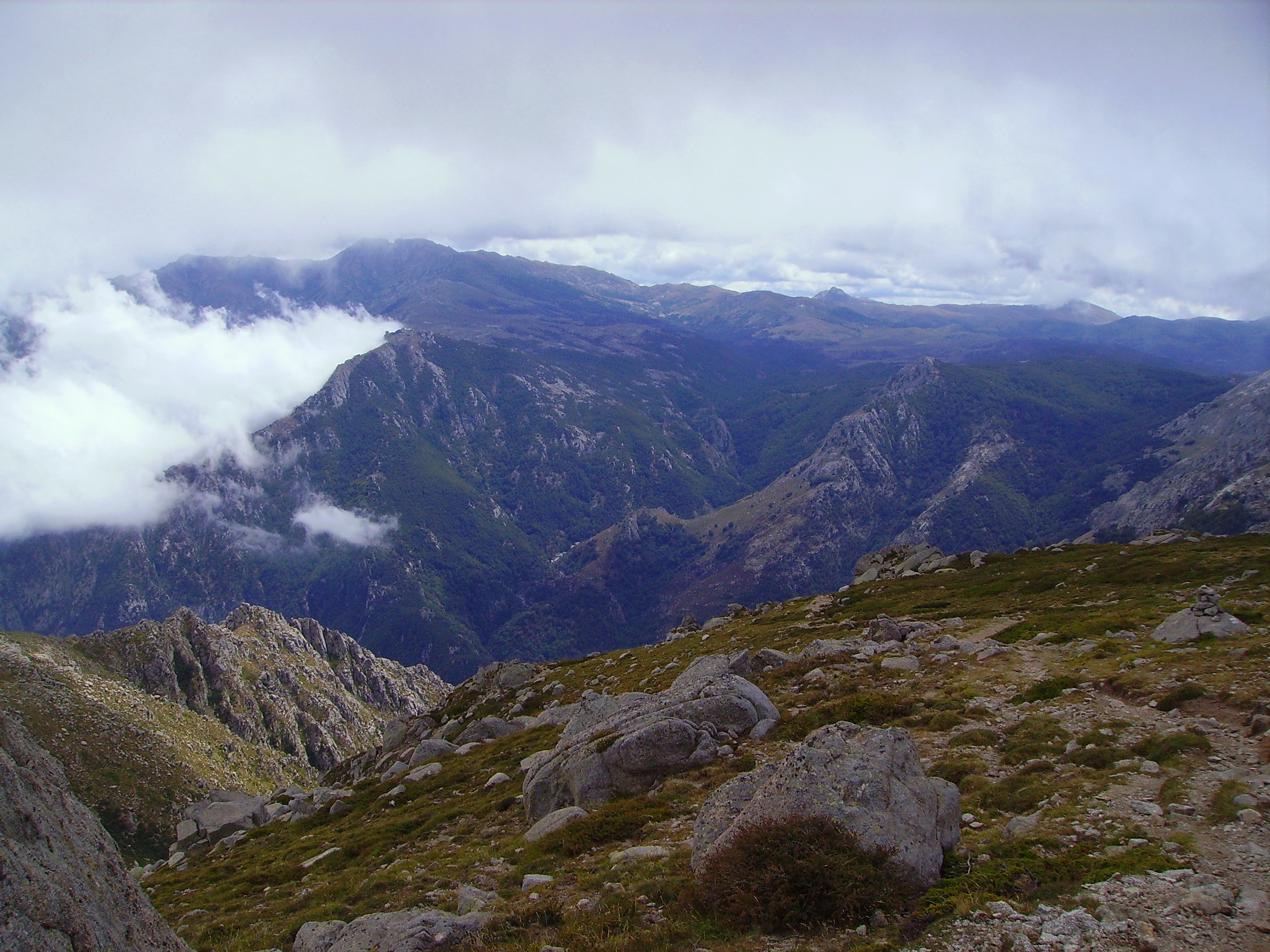 Monte Incudine depuis le Monte Formicola